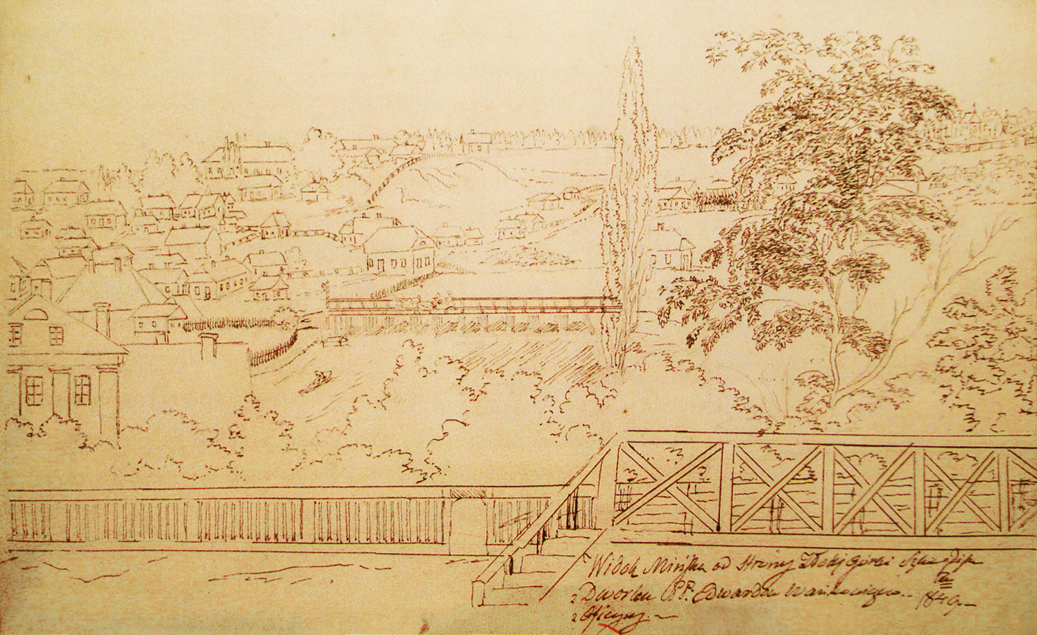 Беларуская (тарашкевіца): Менск (Miensk), Валокі Полацкія (Vałoki Połackija)